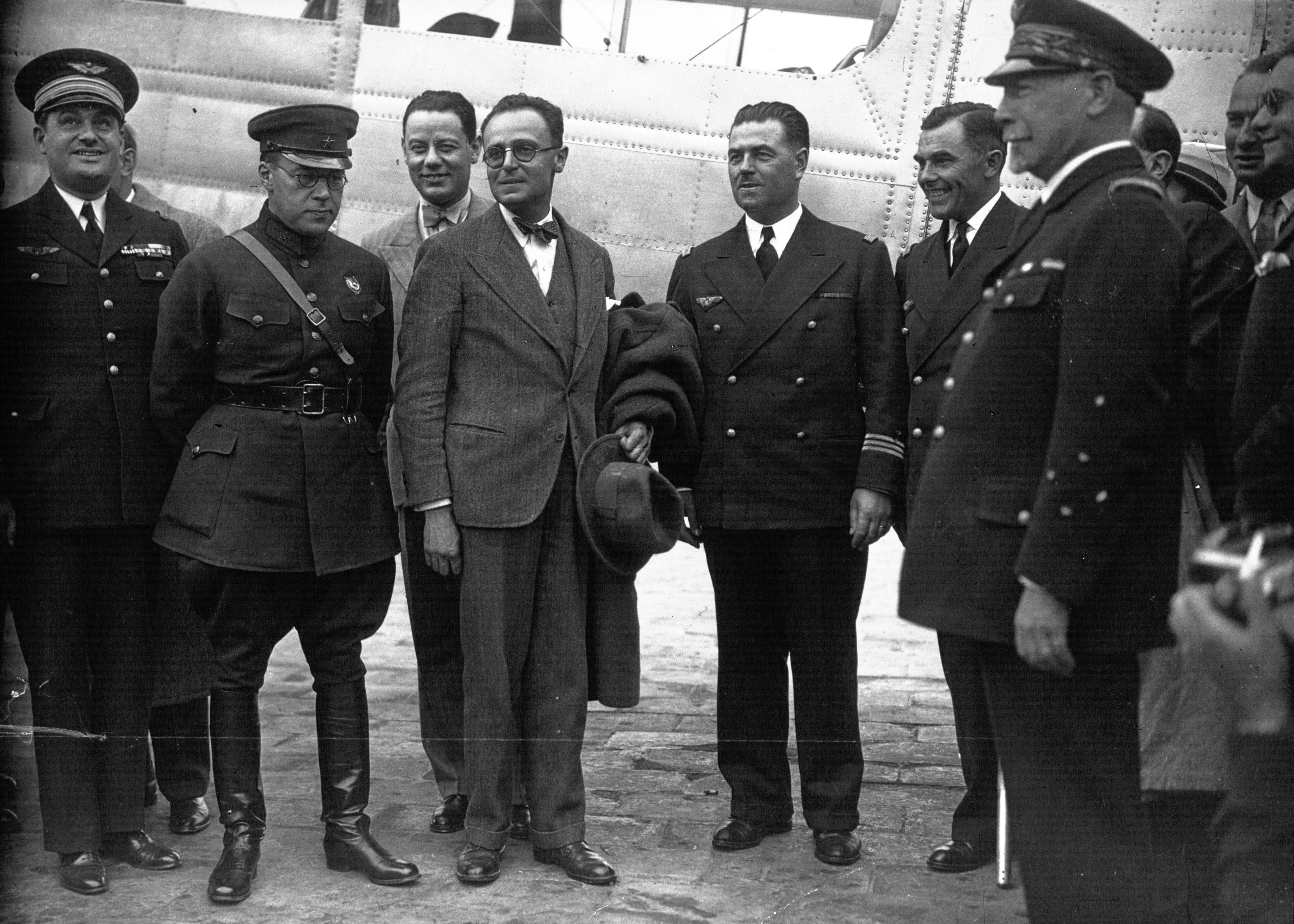 Le Bourget : départ de Pierre Cot pour la Russie, M. Pierre Cot et le général Wantzoff, attaché russe : photographie de presse